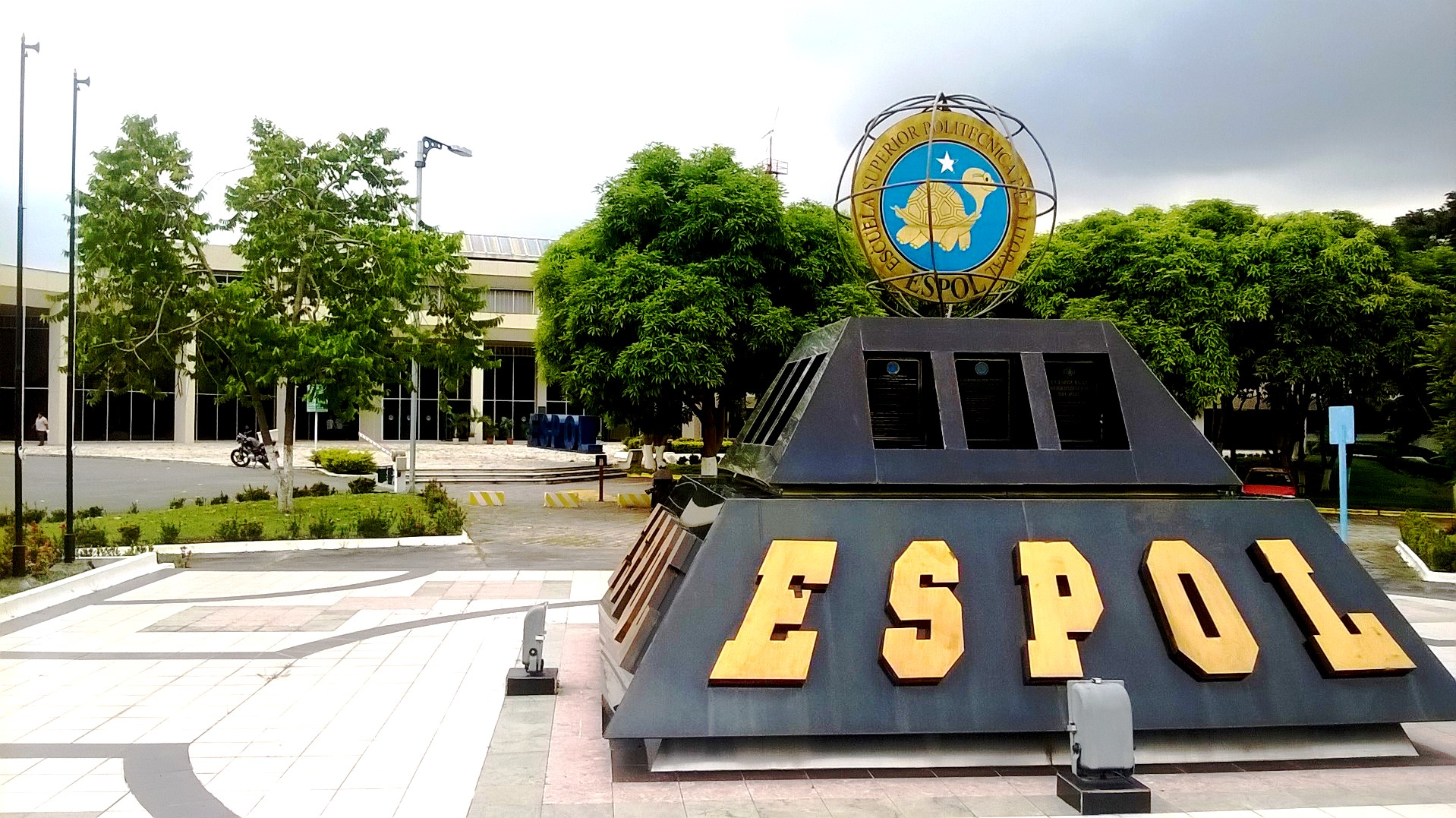 Escuela Superior Politécnica del Litoral